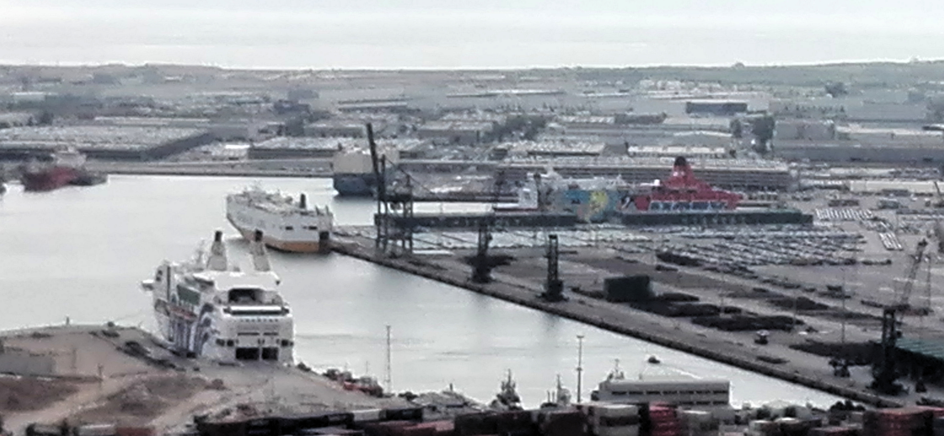 Els vaixells Moby Dada (al dreta) i Rhapsody (a l'esquerra), que allotgen les FSE espanyoles al port de Barcelona durant les protestes de setembre de 2017.